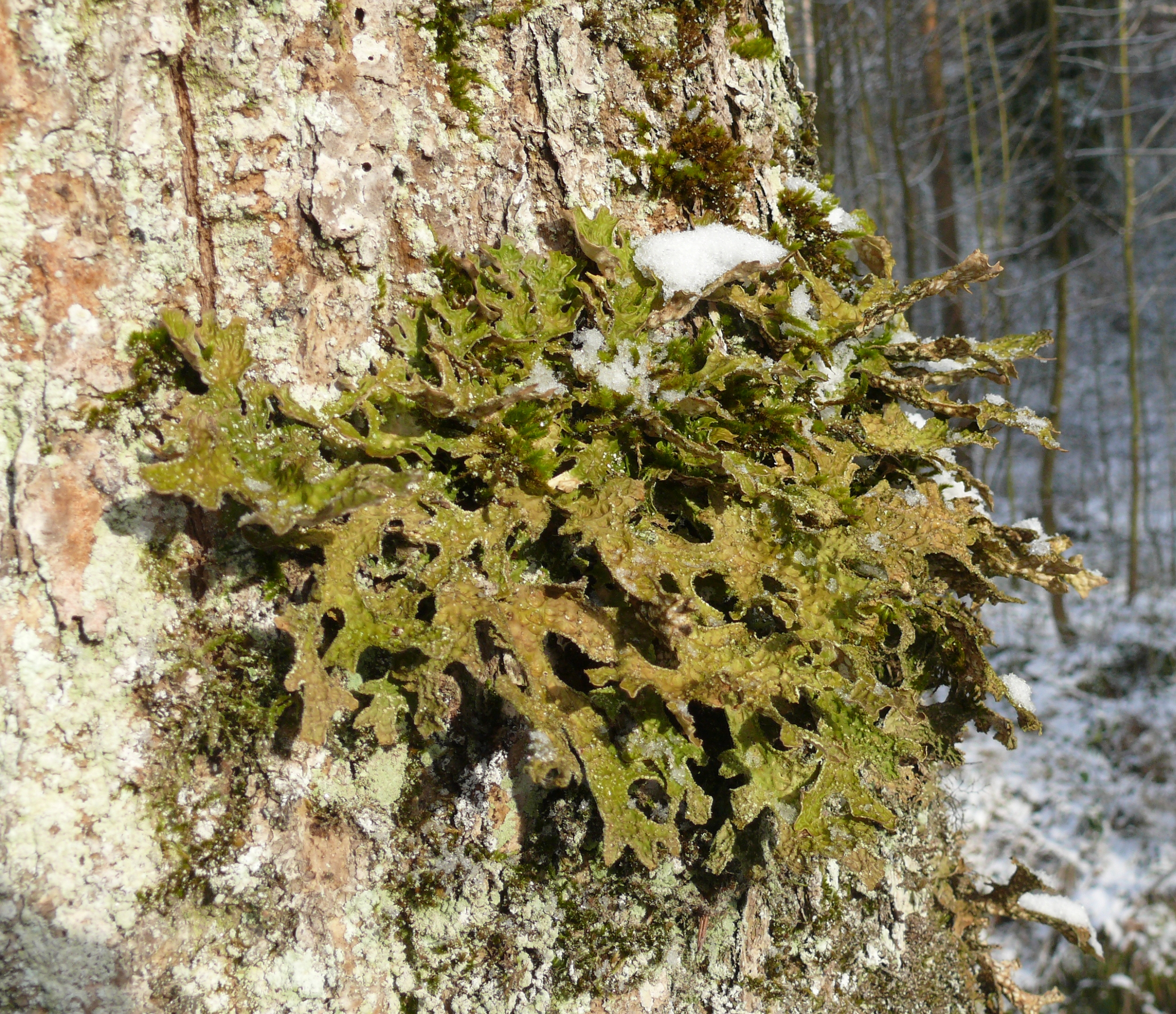 Lobaria pulmonaria, Schwäbisch-Fränkische Waldberge, Germany